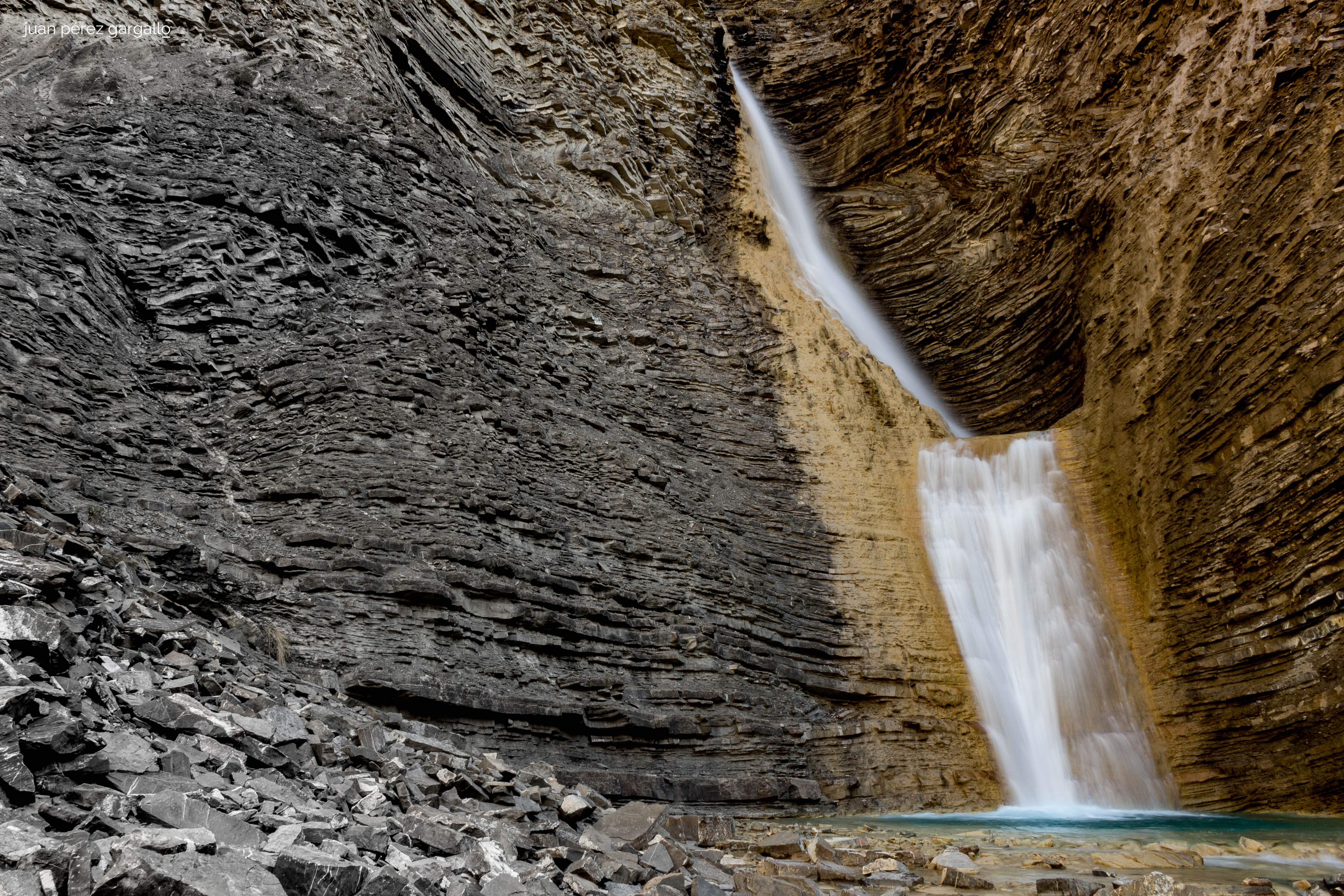 Cascada de Os Lucas